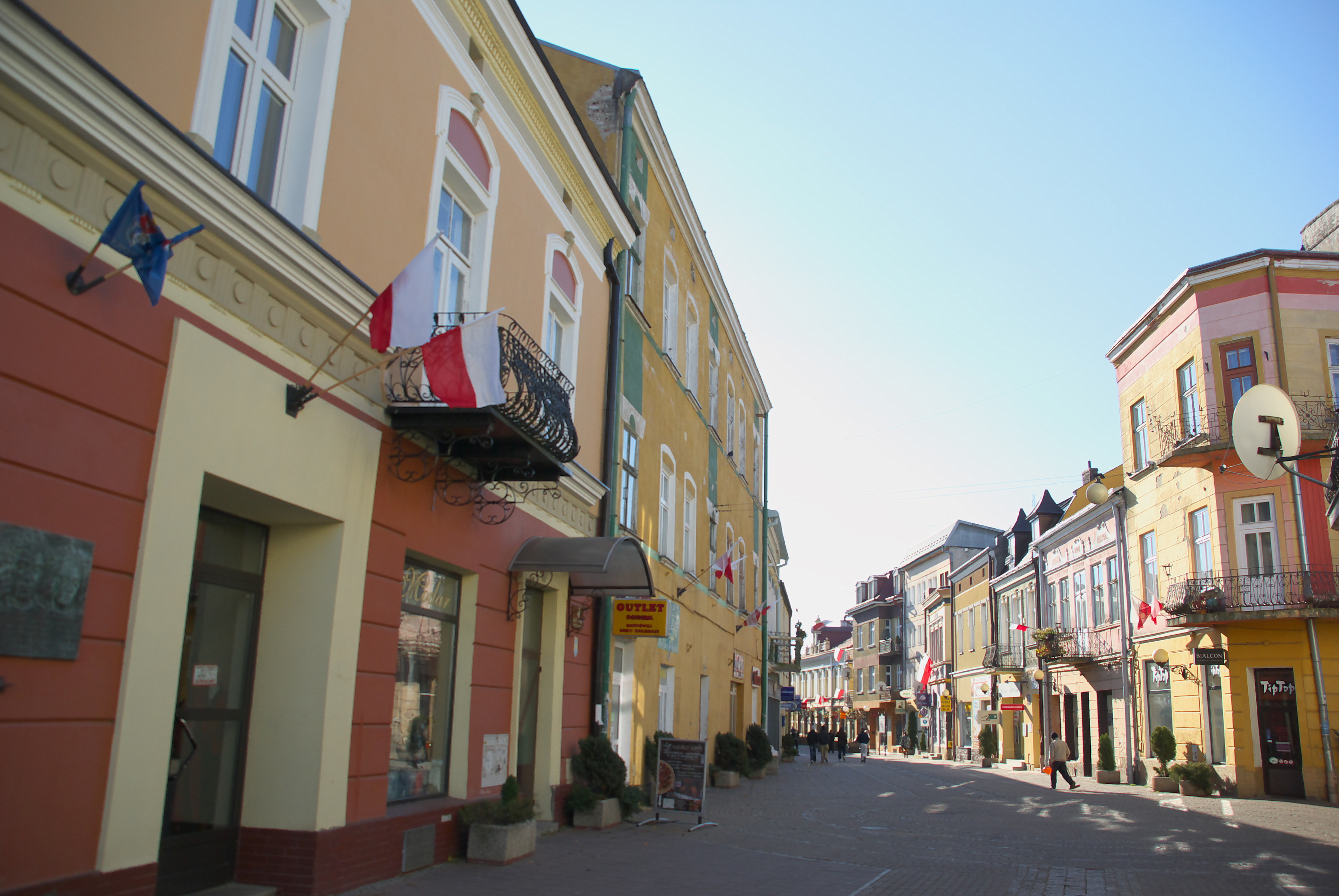 Ulica 3 Maja w Sanoku Dzień Niepodległości 11.11.11